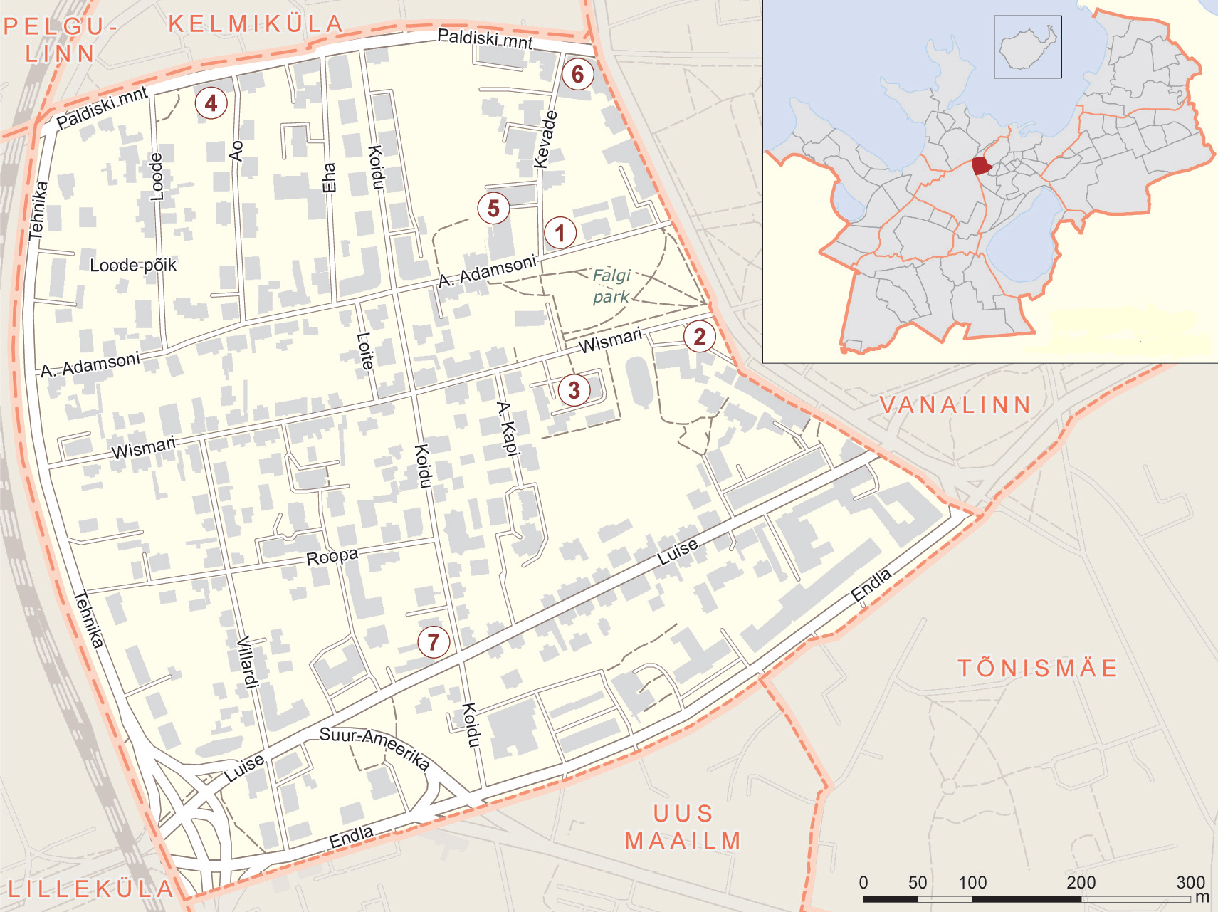 Kassisaba asumi kaart